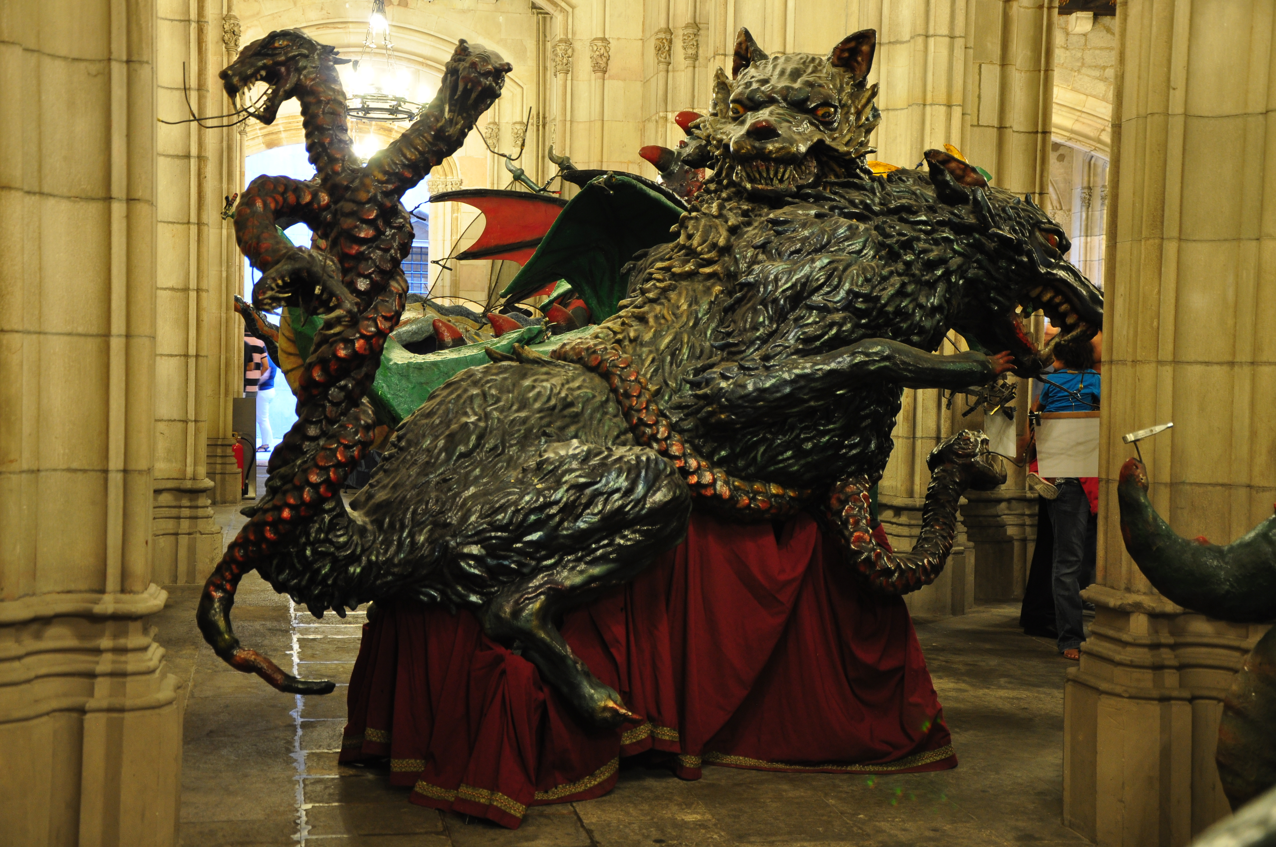 La Mercè 2012 - Bretolàs, el Ca Cerver de la Satanica de Sant Andreu a l'Ajuntament de Barcelona